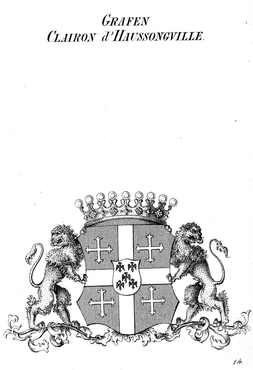 Wappen der Grafen Clairon d'Hausson(g)ville